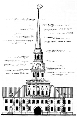 Гравюра с изображением Адмиралтейства второй постройки (архитектор Иван Коробов, 1730-е гг.). Центральная башня. Реконструкция